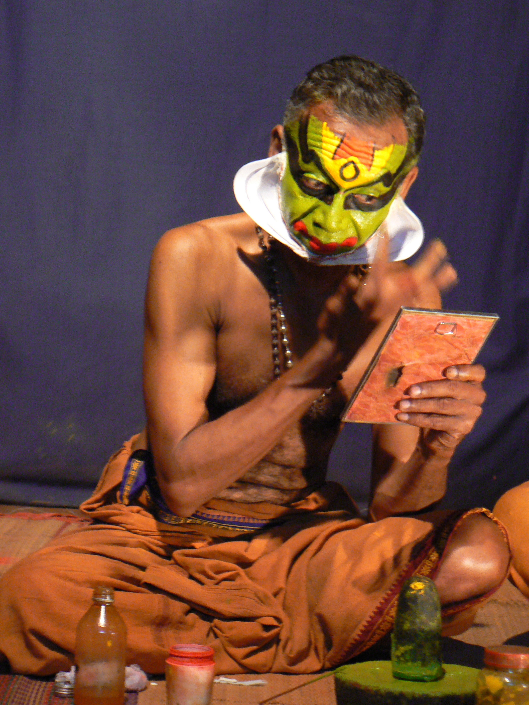 Katakali artist putting on makeup in Kochi, Kerala, India.